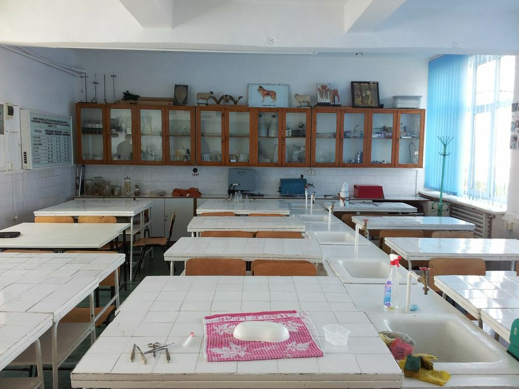 Cabinetul veterinar al Colegiului Tehnic Pontica